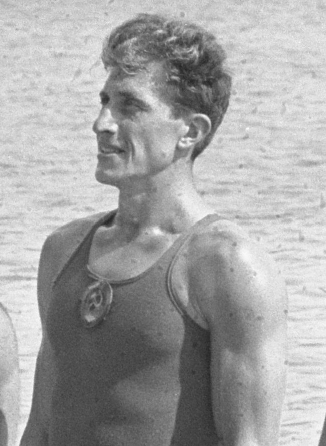 Europese roeikampioenschappen Bosbaan, 6 vier met Rusland 7 Blaisse en Venemans